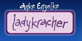 Logo der Fernsehserie Ladykracher